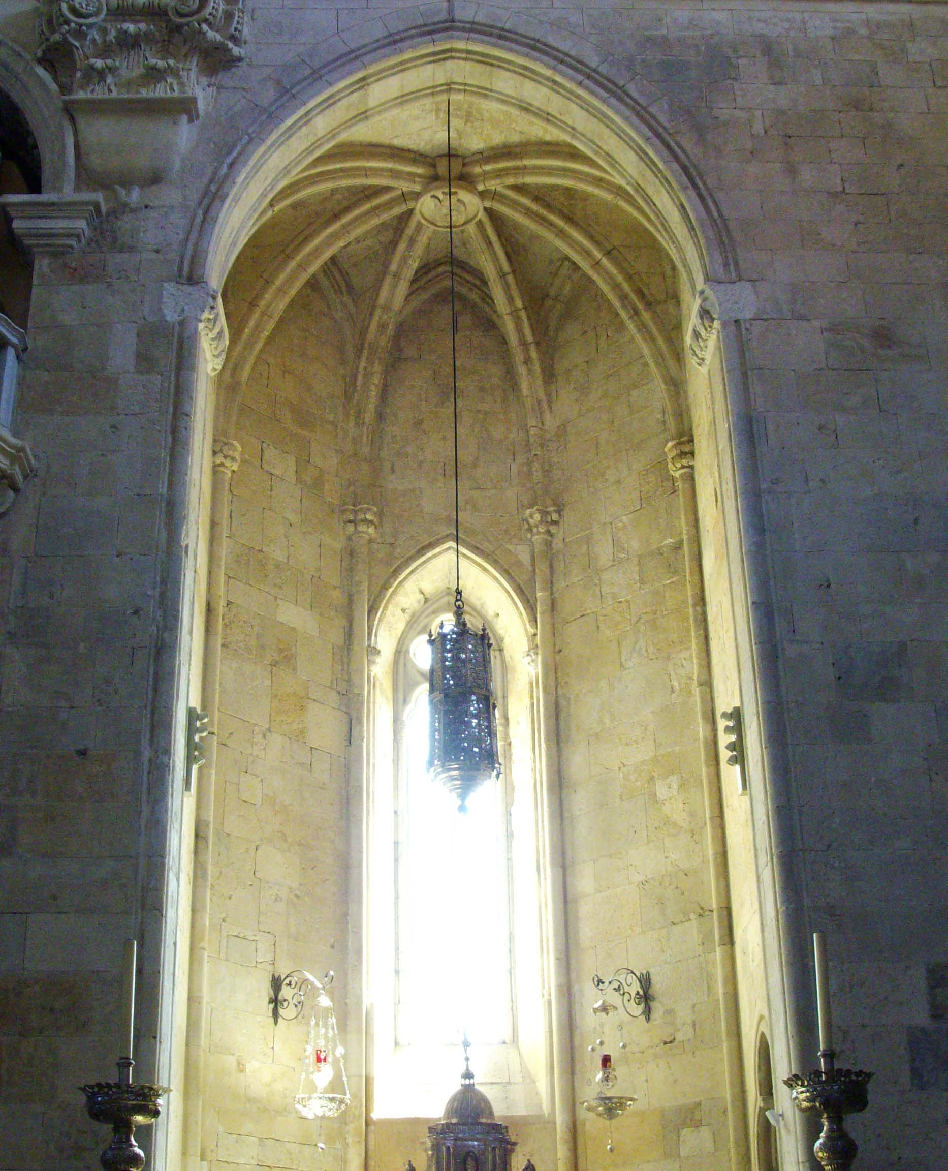 Cappella Aragonese o della Sacra Spina (XIV secolo) nel Duomo di Cagliari